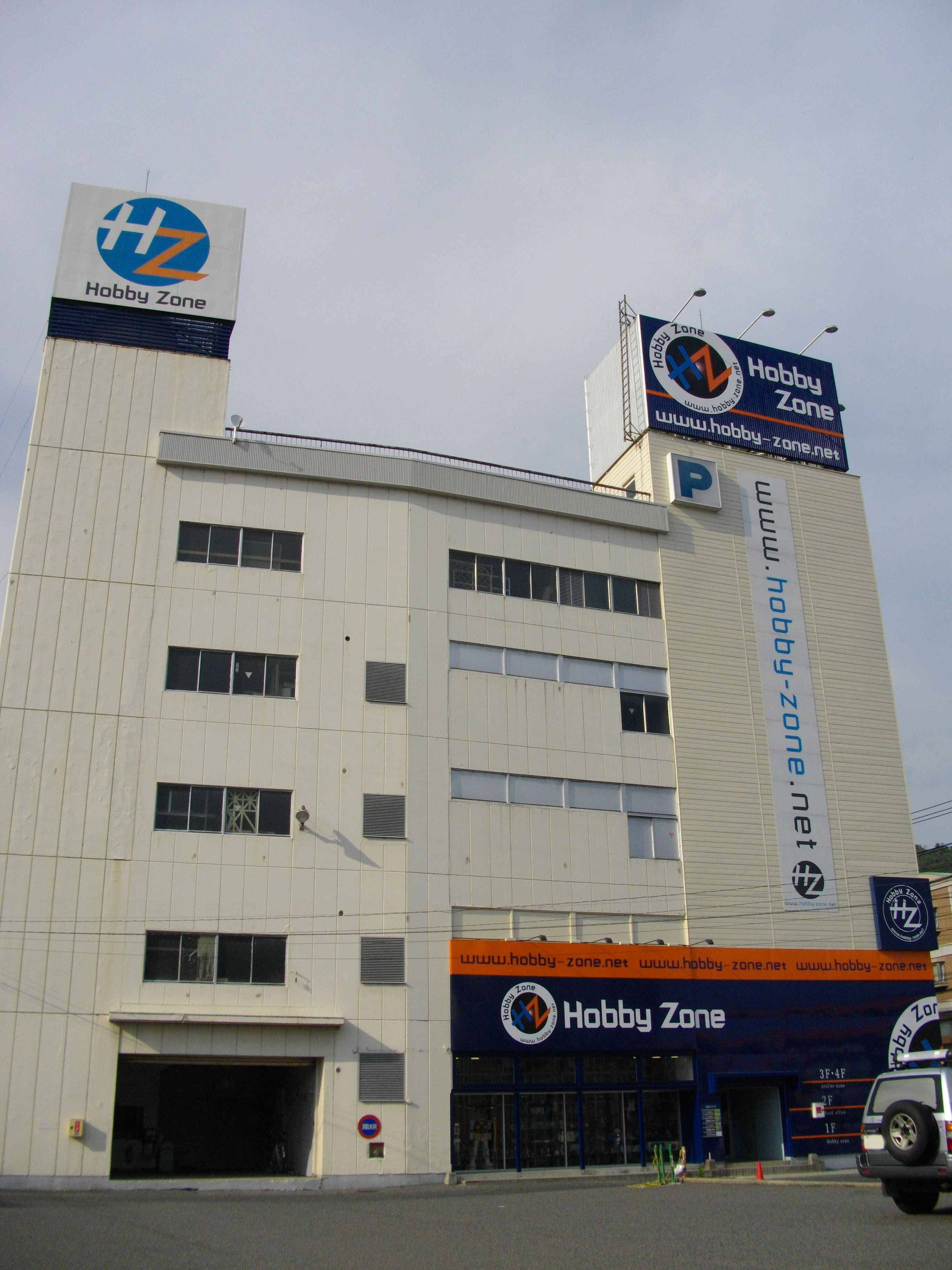 可部プラザ(冒険王 本部/ホビーゾーン可部店)（広島県広島市安佐北区）